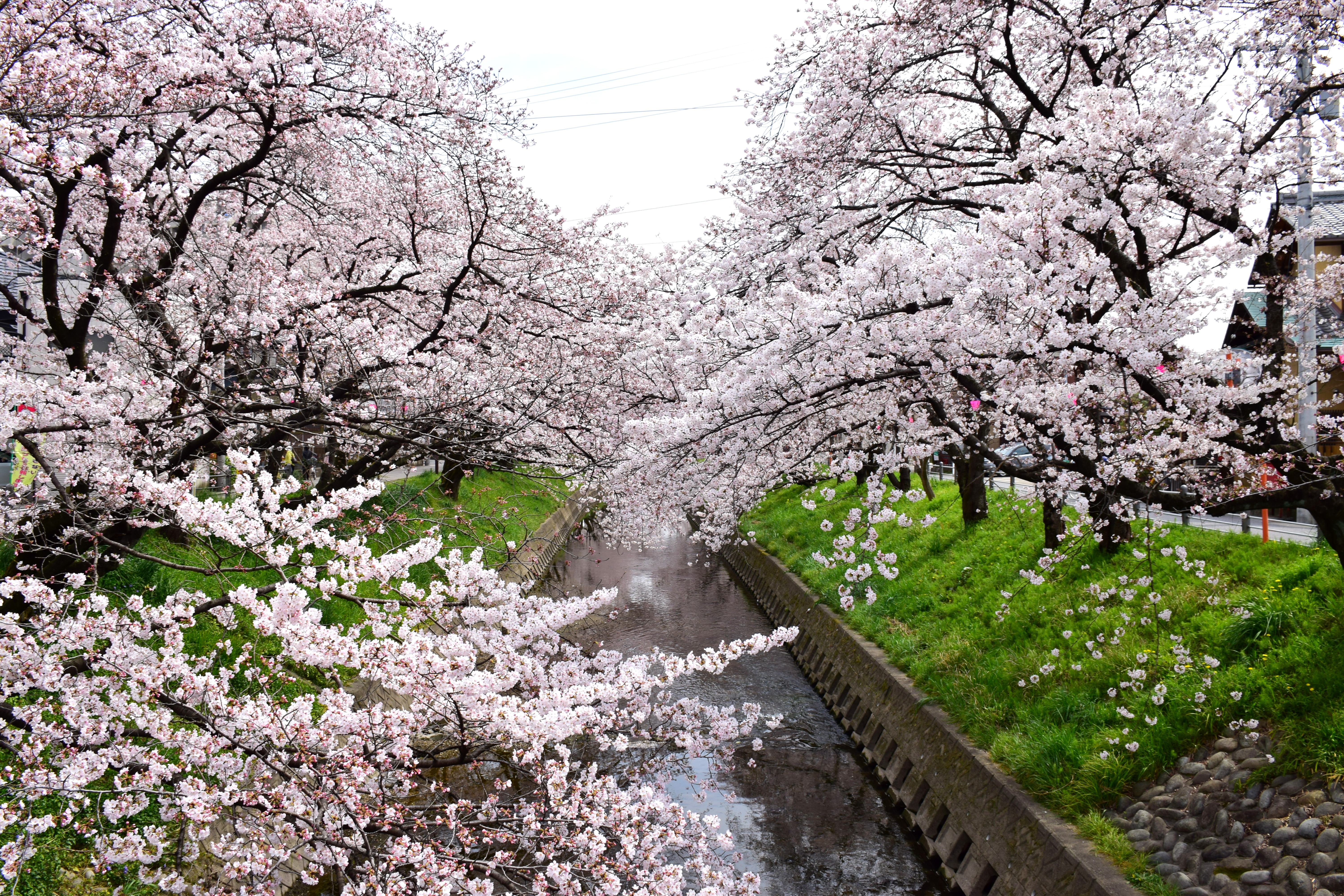 五条川の桜